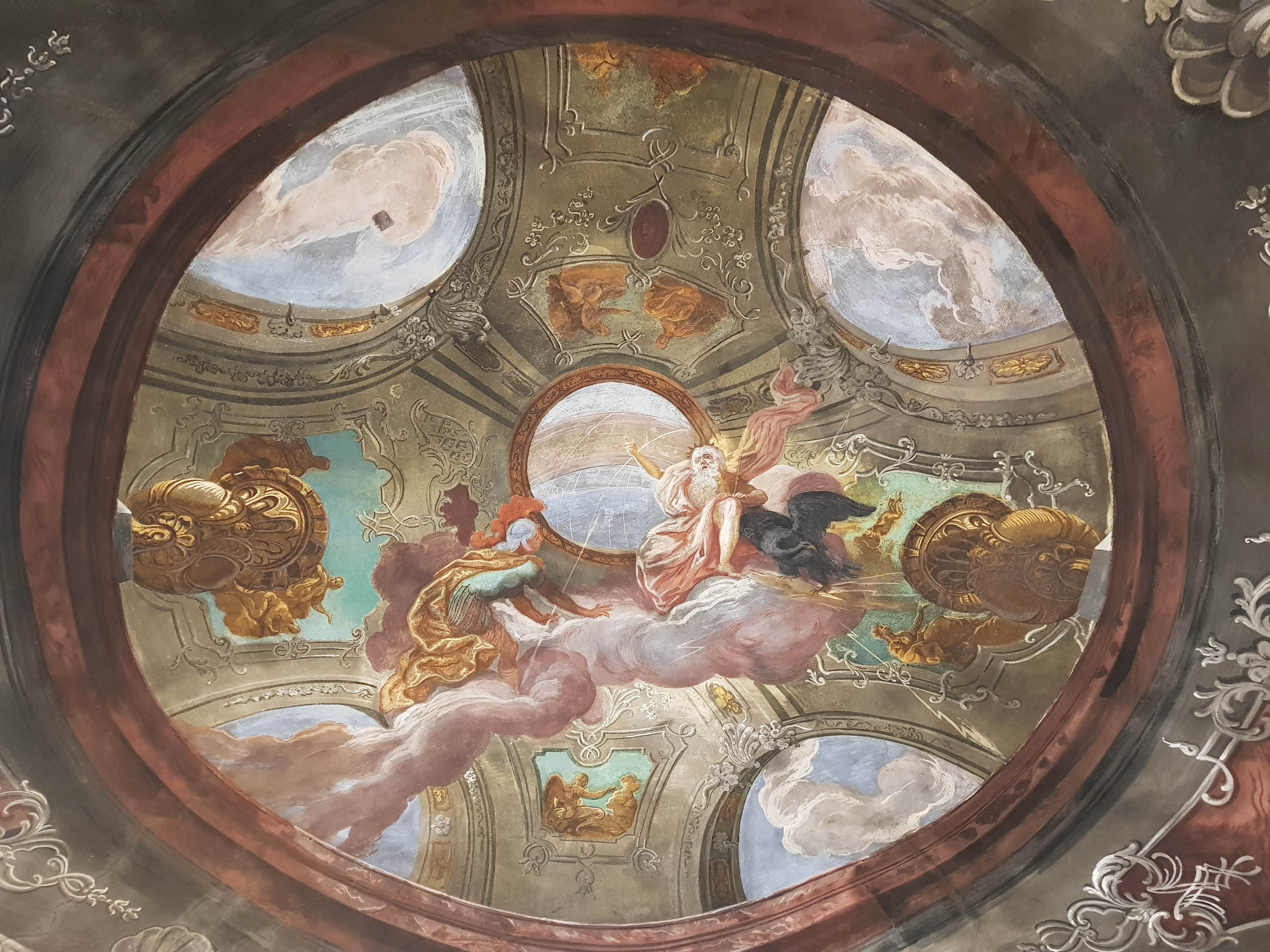 Interiéry zámku Manětín